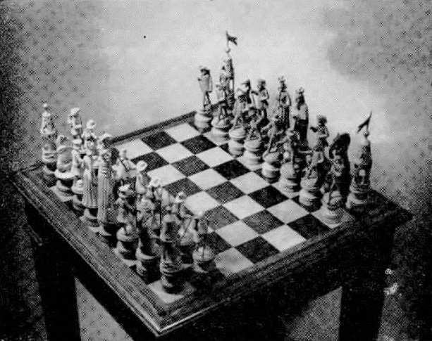 Tabuleiro de xadrez que pertenceu a Machado de Assis. Nos anos 60, o tabuleiro estava na posse do Marechal Estevão Leitão de Carvalho. No final dos anos 90, o tabuleiro de madeira e vidro, em estilo imperial, estava mantido junto a diversos outros móveis de Machado, como sua cama e mesa da sala de jantar, em más condições de conservação na biblioteca do Centro de Letras e Artes da Uni-Rio.[1]